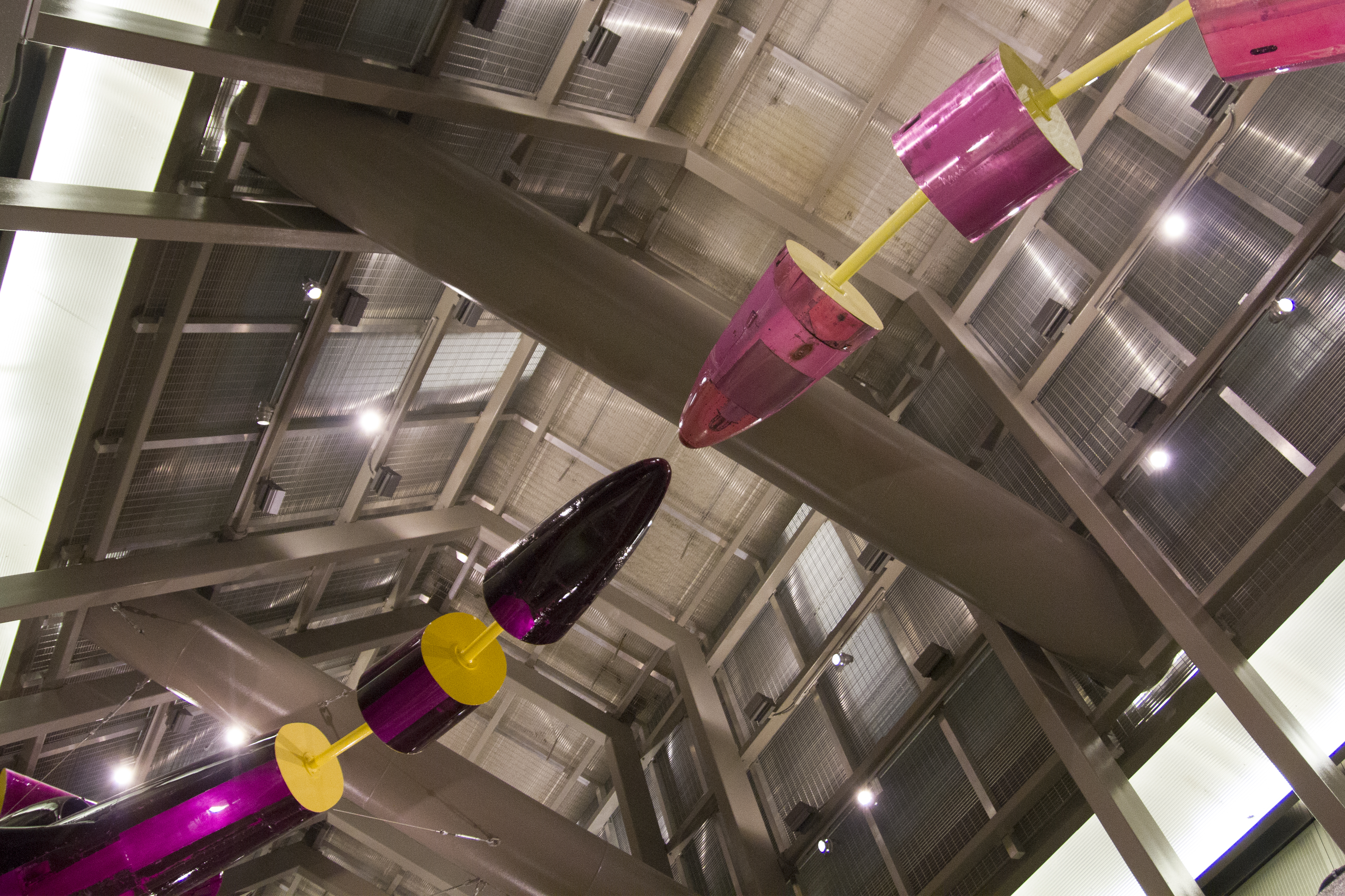 Capitol Hill Station Media Tour 05-26-15 08